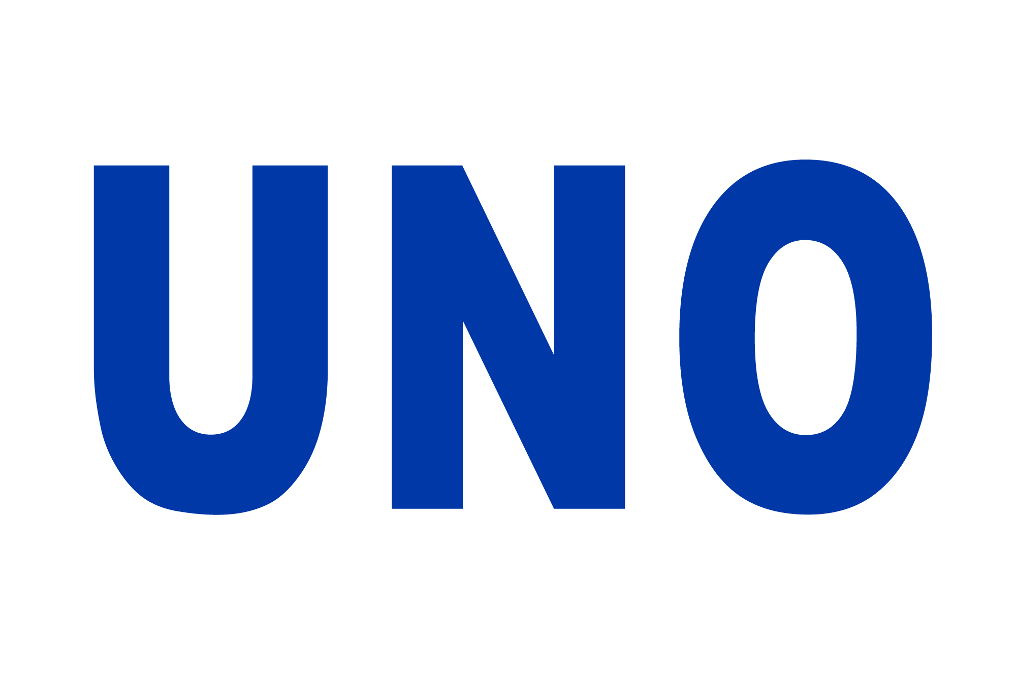 Bandera de la Unión Nacional Opositora (UNO), creada en Nicaragua en 1989. Basada en imágenes aparecidas, por ejemplo, en